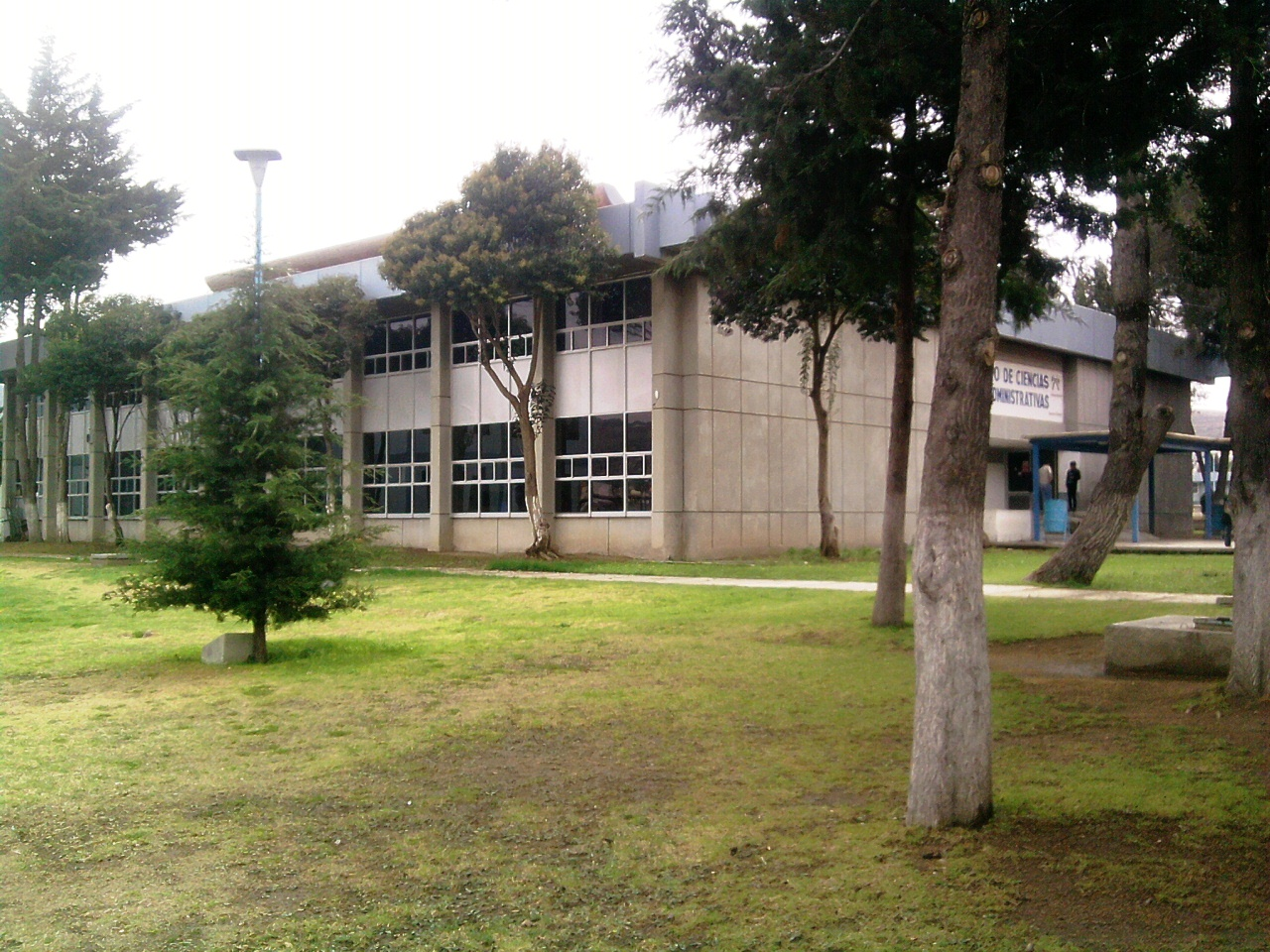 Edificio de la UAEH